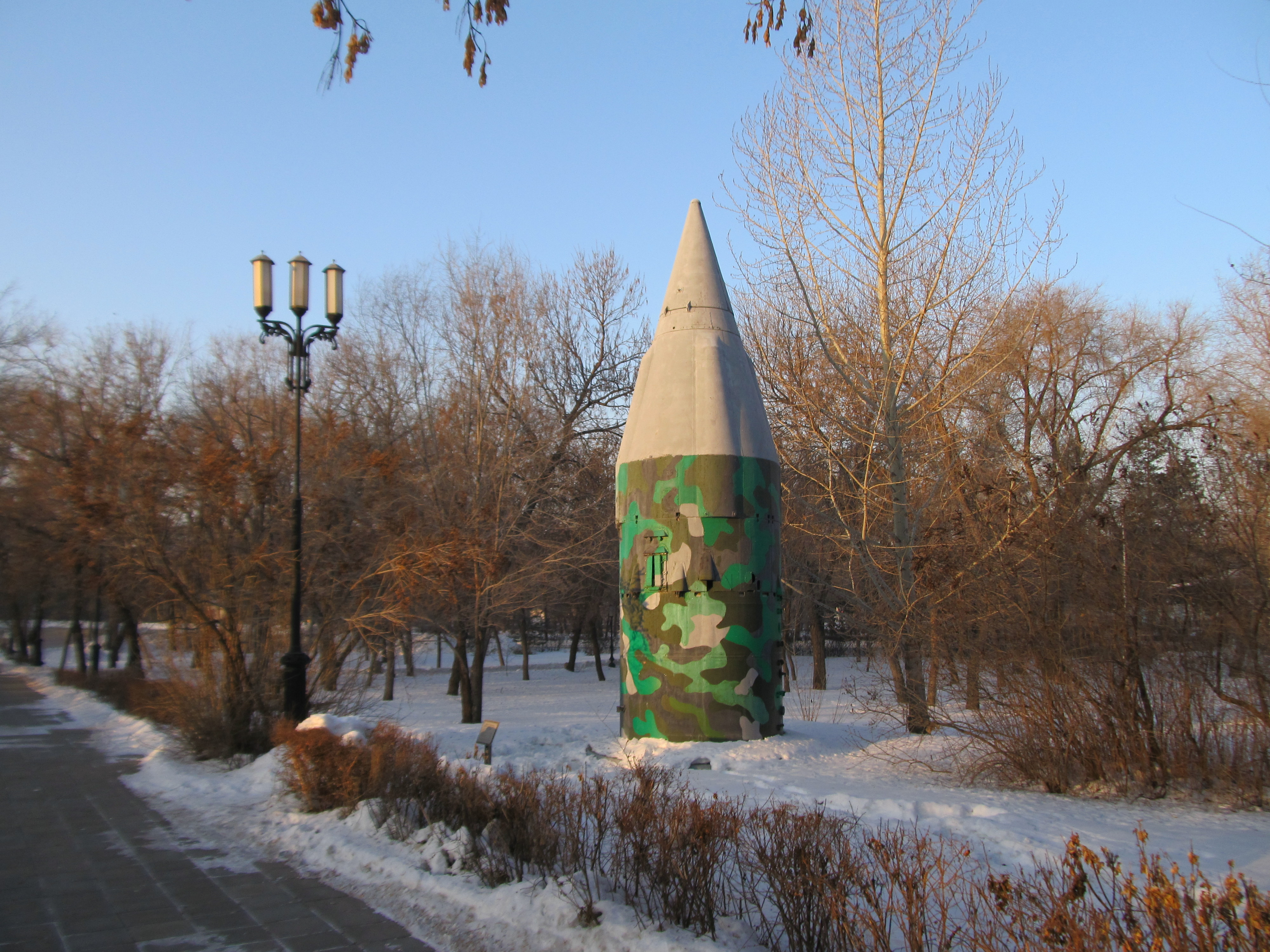 Рысак в мемориальном комплексе-музее Салют, Победа